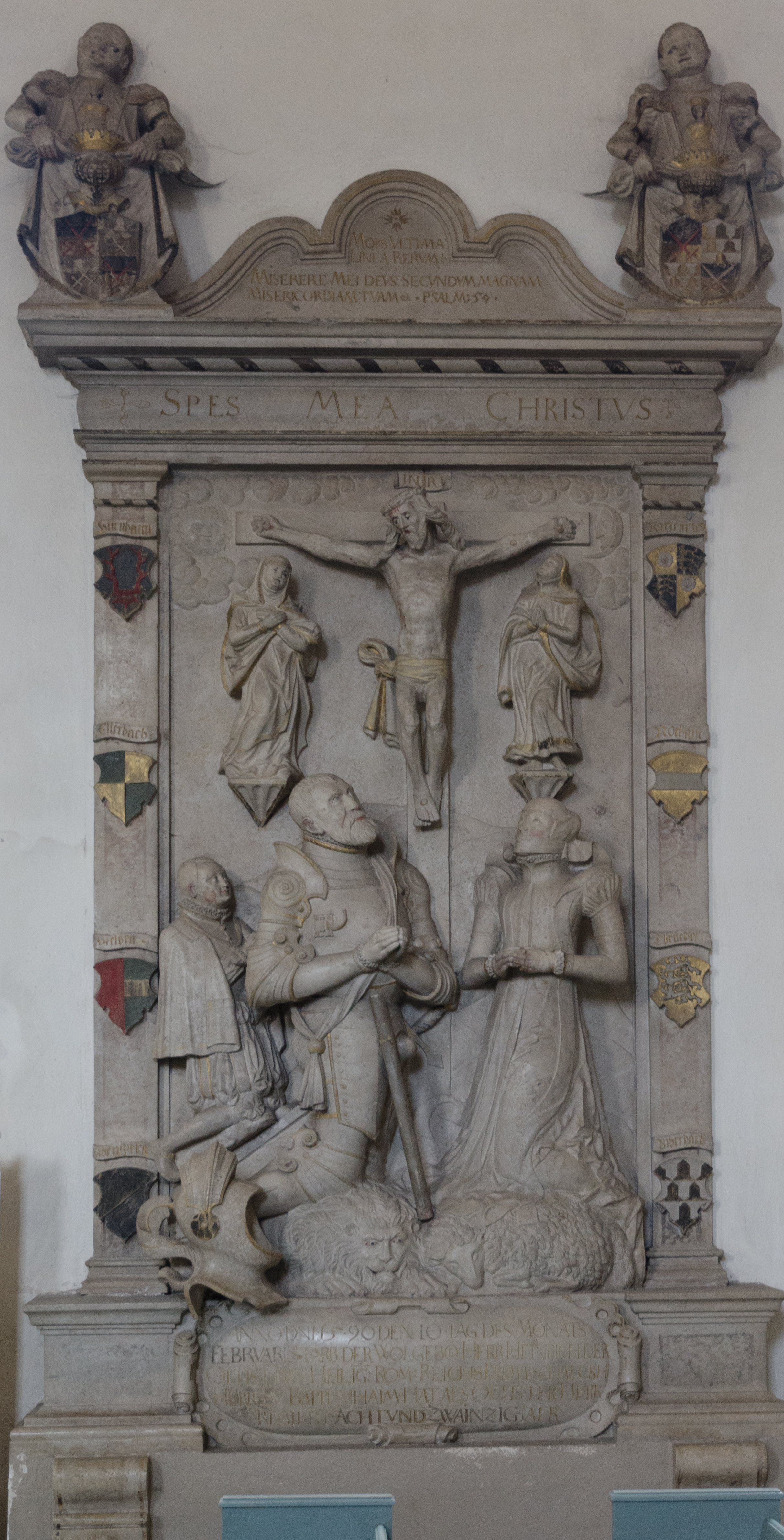 Pappenheim, Ev. Stadtpfarrkirche, Epitaph von Heinrich von Pappenheim († 10. Februar 1590)